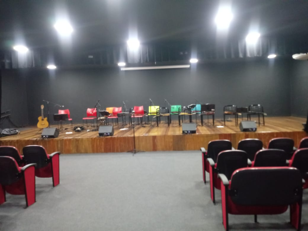 Auditório do Palácio da Cultura, em Teresina.